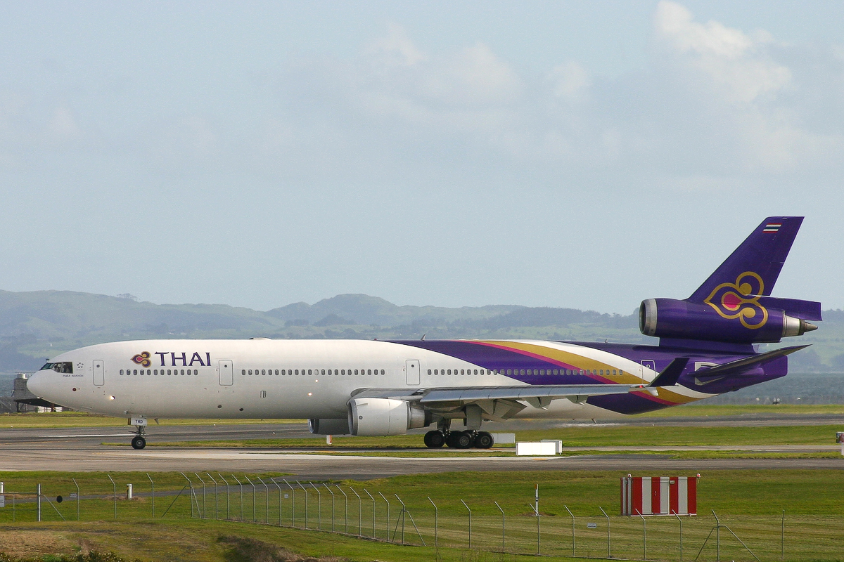 McDonnell Douglas MD-11